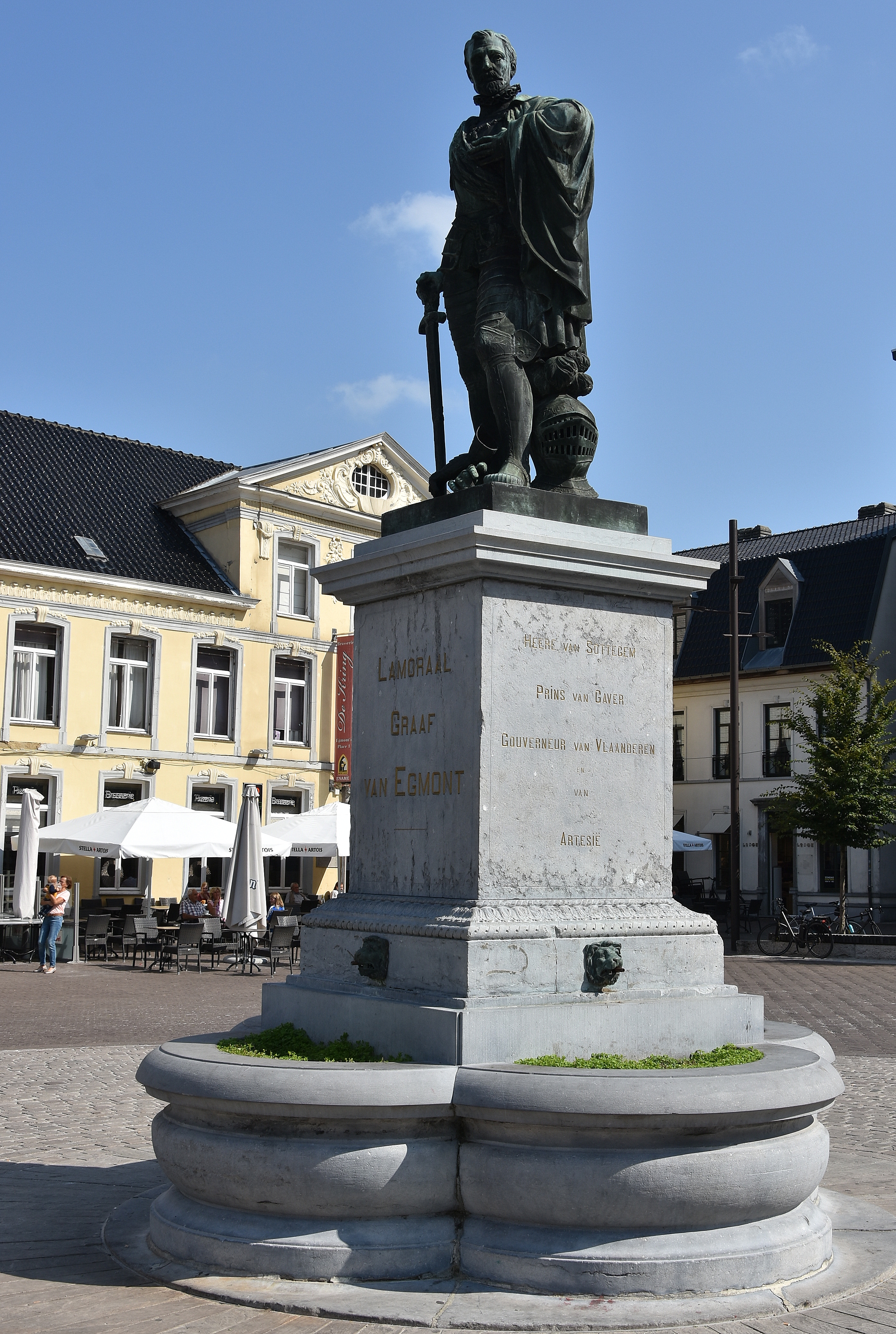 Standbeeld Lamoraal van Egmont - Markt Zottegem 1-09-2018 12-02-48 This photo of immovable heritage has been taken in the Flemish Region